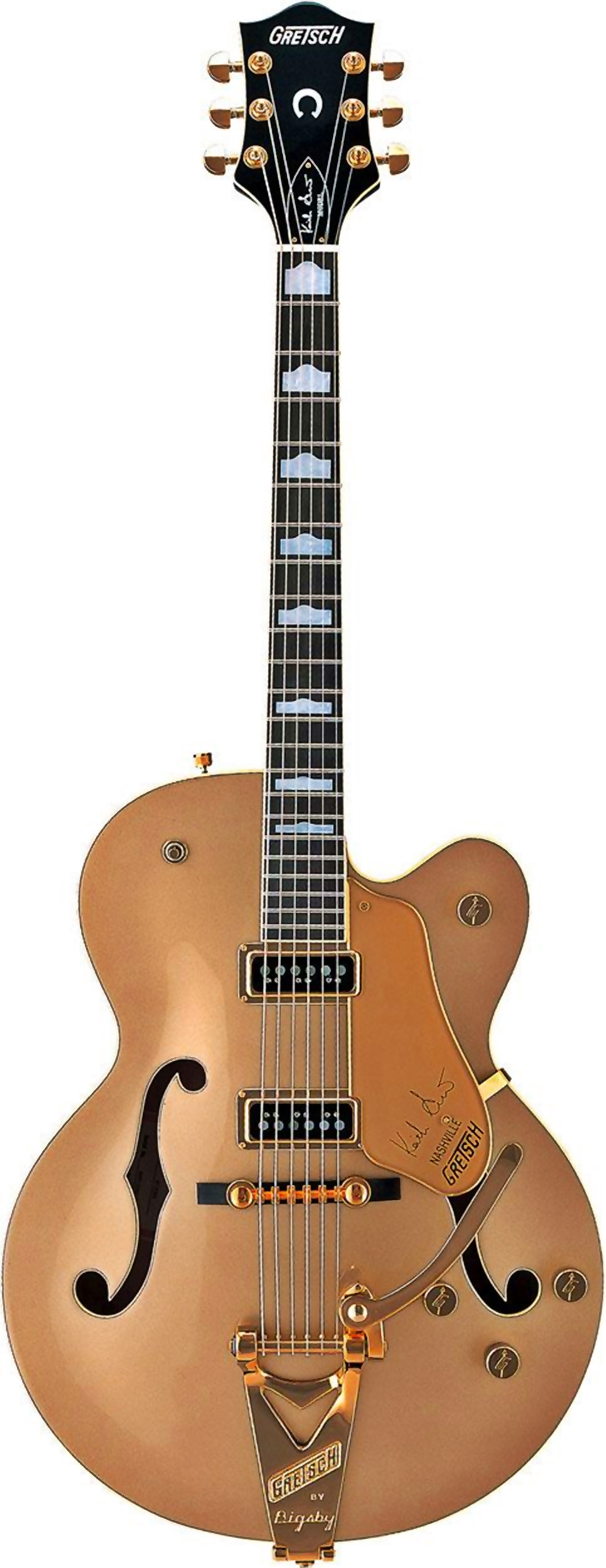 Gretsch Keith Scott Artist Model 6120KS Nashville